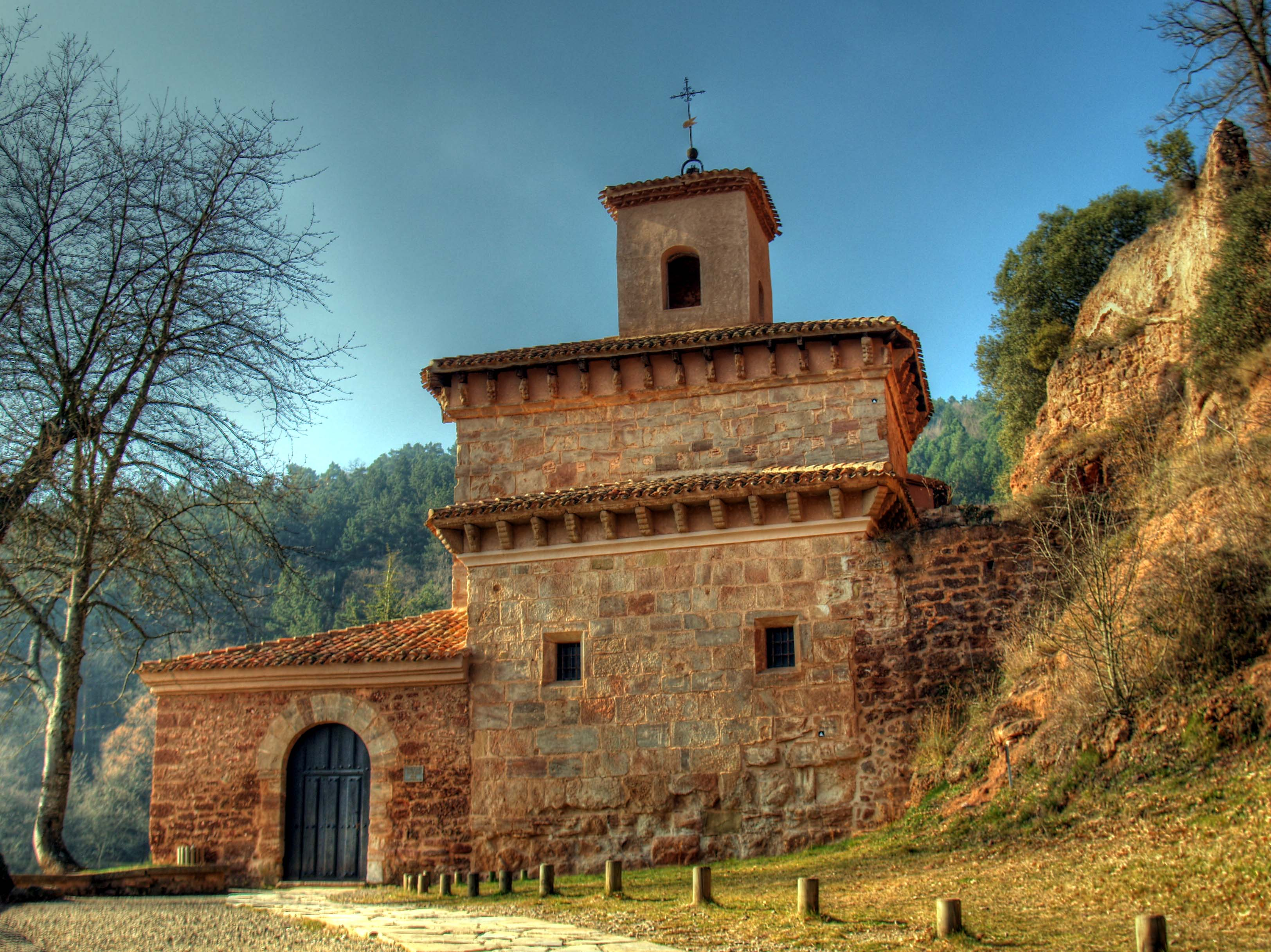 Los orígenes del Monasterio de Suso hay que explicarlos necesariamente a partir de la vida del santo Millán. Es el santo el que da nombre al valle y al pueblo, a las devociones y al monasterio. Millán vivió como un anacoreta en unas cuevas, donde hoy está el monasterio, en las que fue también enterrado en el año 574. The Monastery of Suso was the scene for the appearance of the first words of Castilian or Spanish and also of the first poems in our tongue. It was declared a World Heritage site on 4 December 1997